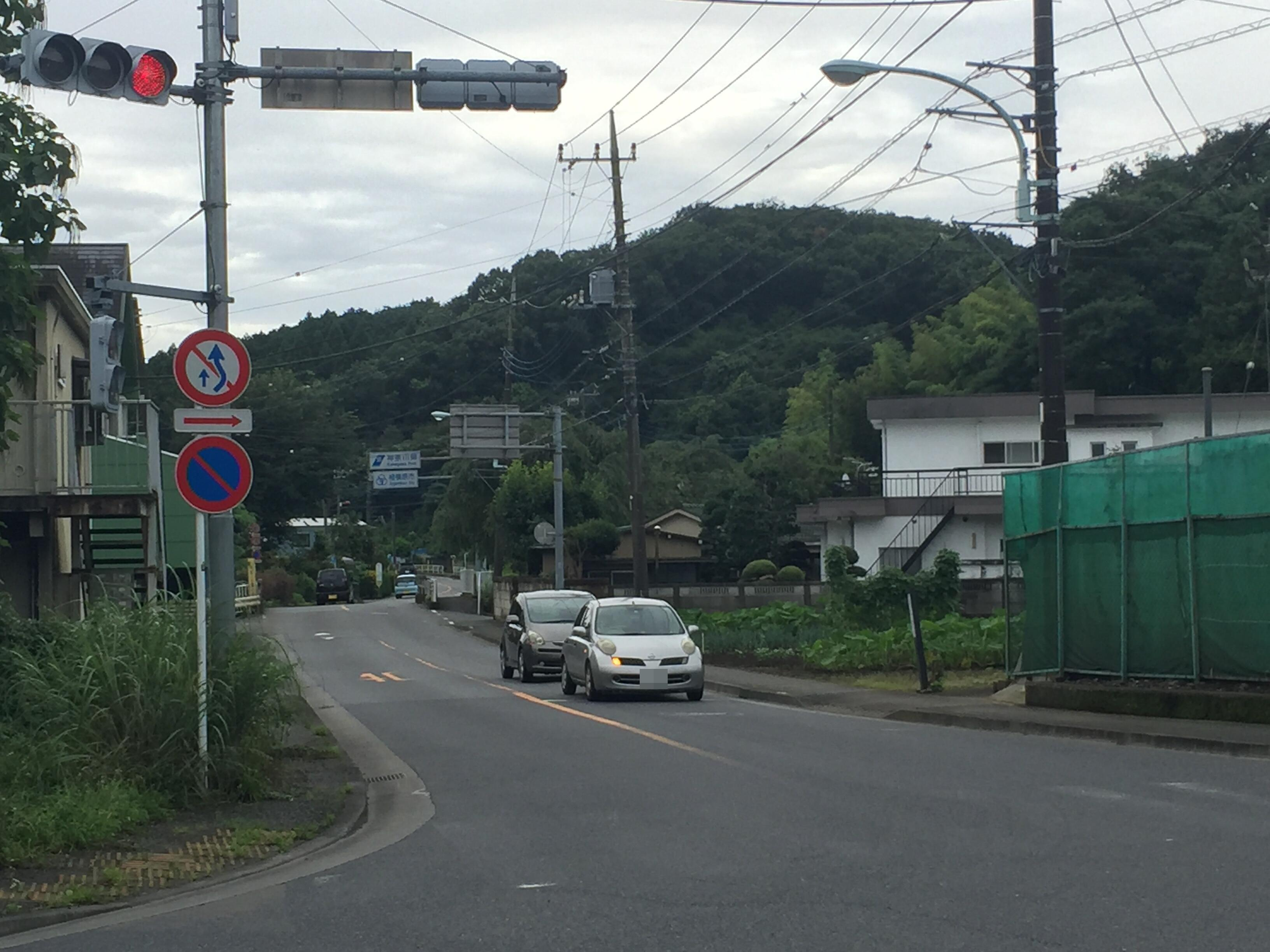 大戸交差点（町田市相原町）。都道48号線城山方面。起点から約130ｍ先は都県境となり、すぐに神奈川県相模原市に入る。